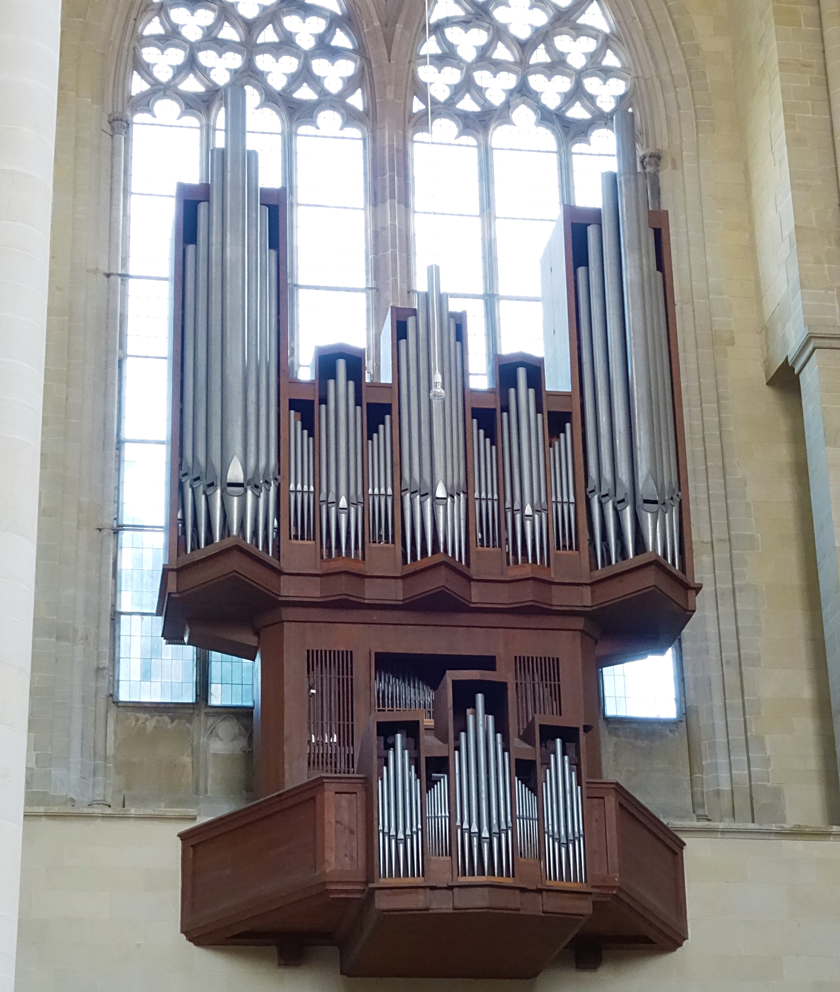 Querhausorgel (Paradies-Orgel) von Alexander Schuke Potsdam Orgelbau (1970, Opus 402, III/P 37) im Magdeburger Dom